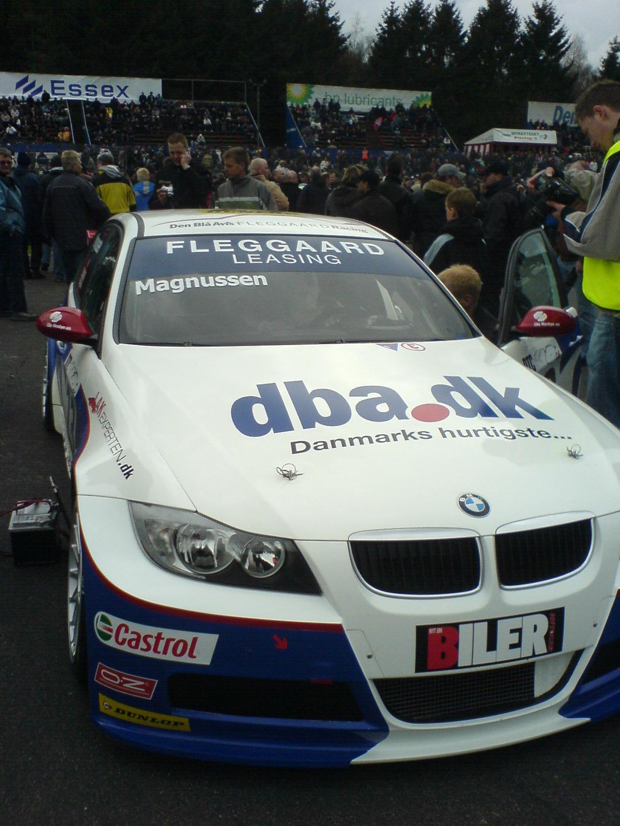 Jan magnussens racerbil